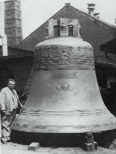 Apolda - Autohaus Pitter